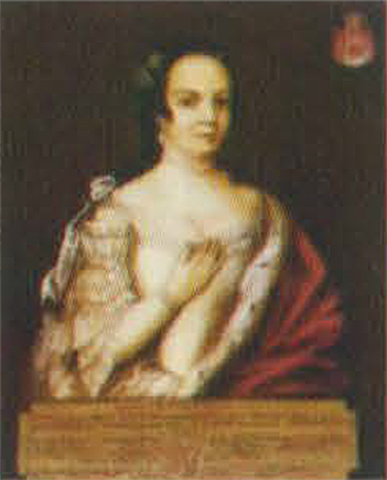 Беларуская (тарашкевіца): Партрэт Ізабэлы Агінскай (Izabeła Aginskaja) з князёў Радзівілаў (Radzivił)